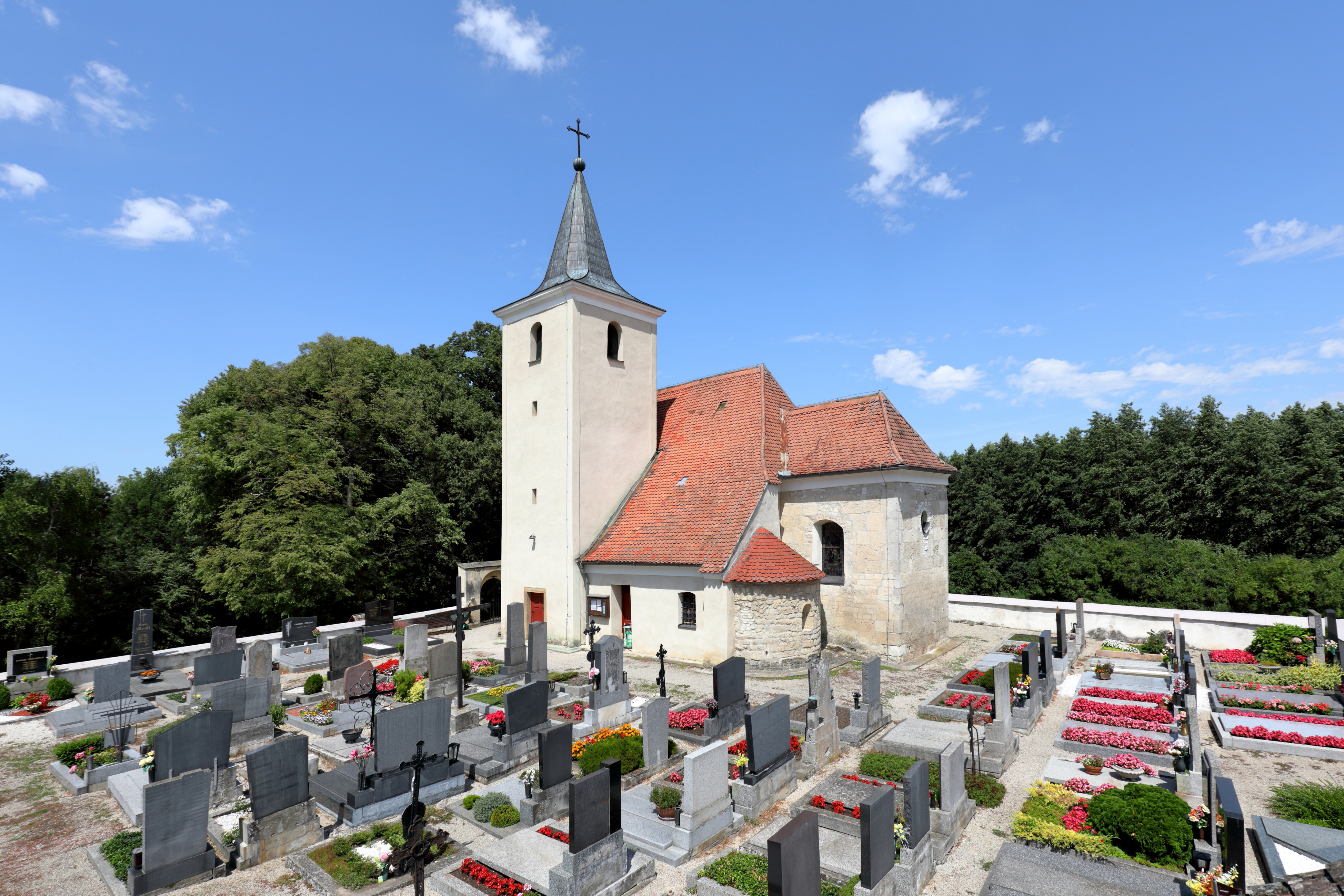 Südostansicht der röm.-kath. Pfarrkirche hl. Ägyd in Grafensulz, ein Ortsteil der niederösterreichischen Marktgemeinde Ladendorf.Die vom Friedhof umgebene und in erhöhter Lage südöstlich des Ortes errichtete Kirche ist eine spätromanische Saalkirche mit eingezogenem Chorquadrat, die zur Barockzeit verändert wurde. Südseitig des Chores ist die Apsis des ehemaligen romanischen Karners aus dem 12. Jahrhundert angebaut, die später durch einen Sakristeizubau mit der östlichen Turmwand verbunden wurde.